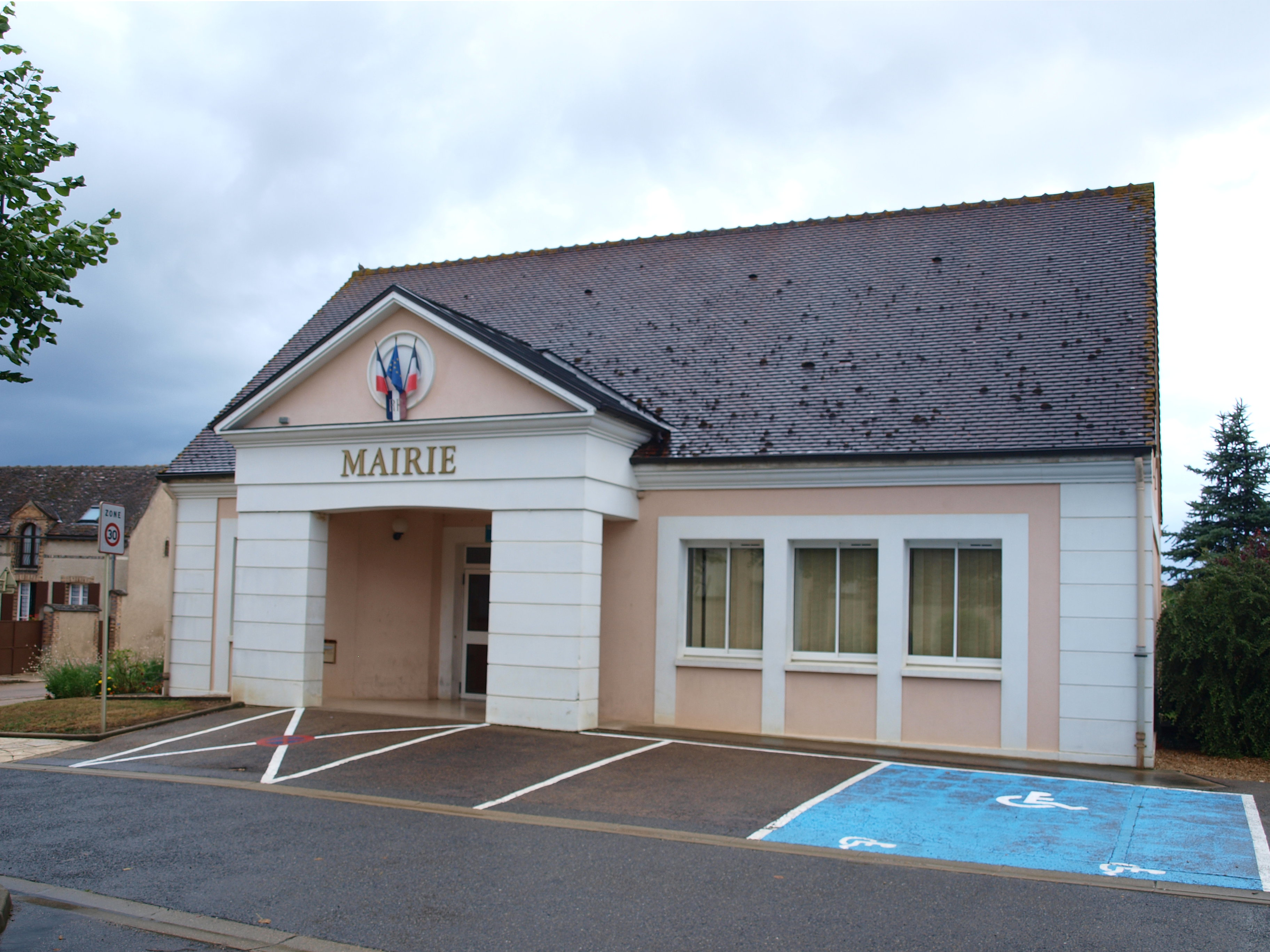 Cuy (Yonne, France) ; mairie